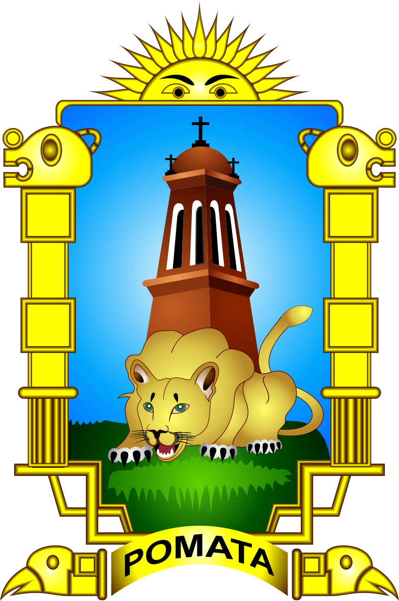 Distrito de Pomata - Provincia de Chucuito - Región Puno